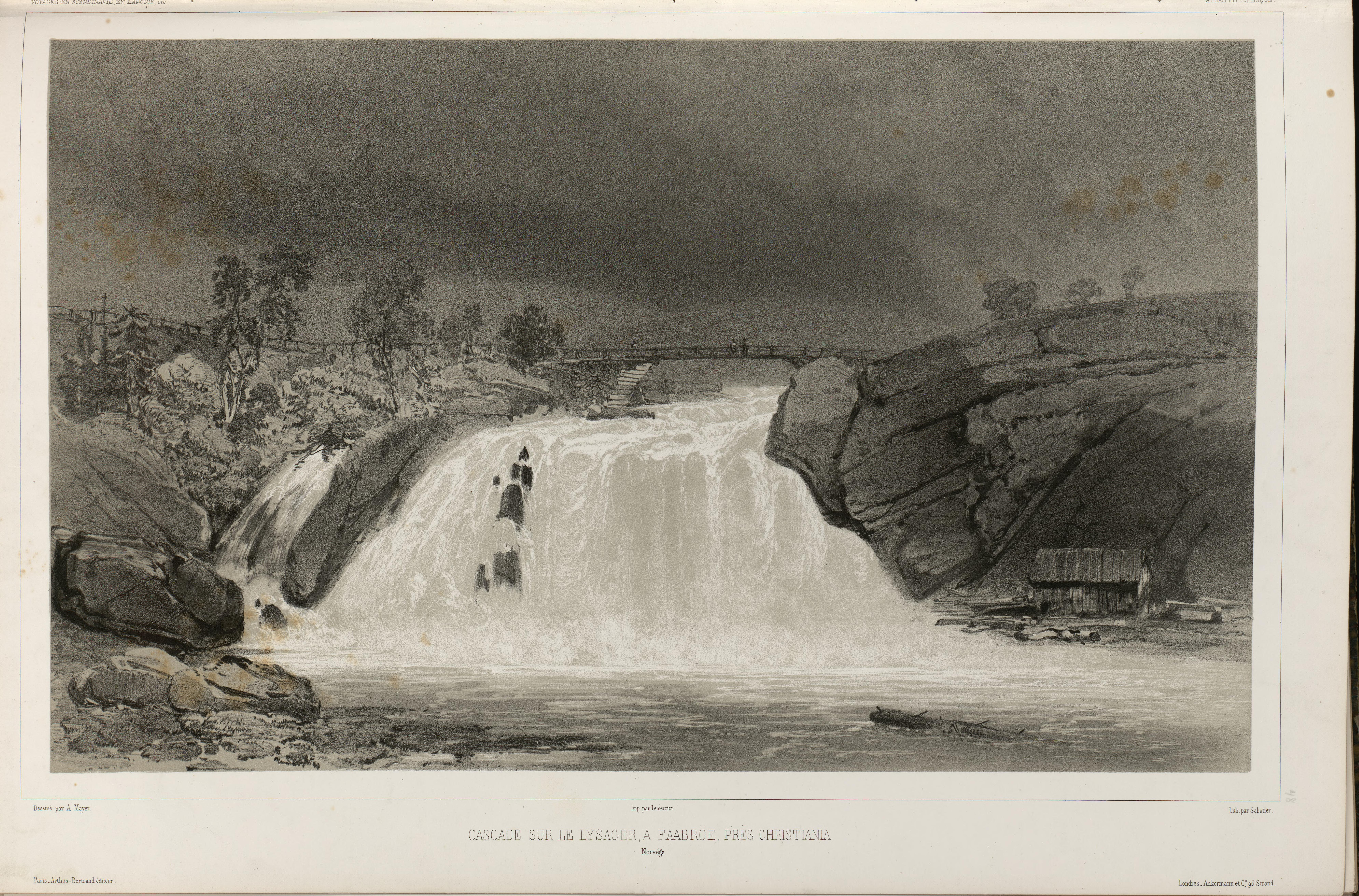 Illustrasjon hentet fra boken "Voyages de la Commission scientifique du Nord, en Scandinavie, en Laponie, au Spitzberg et aux Feröe" av ukjent forfatter og utgitt av Arthus BertrandParis : Arthus Bertrand, [1852] (Paris, [1852]). Motivet viser Granfossen, tidligere kalt Fåbrofossen, i Lysakerelva